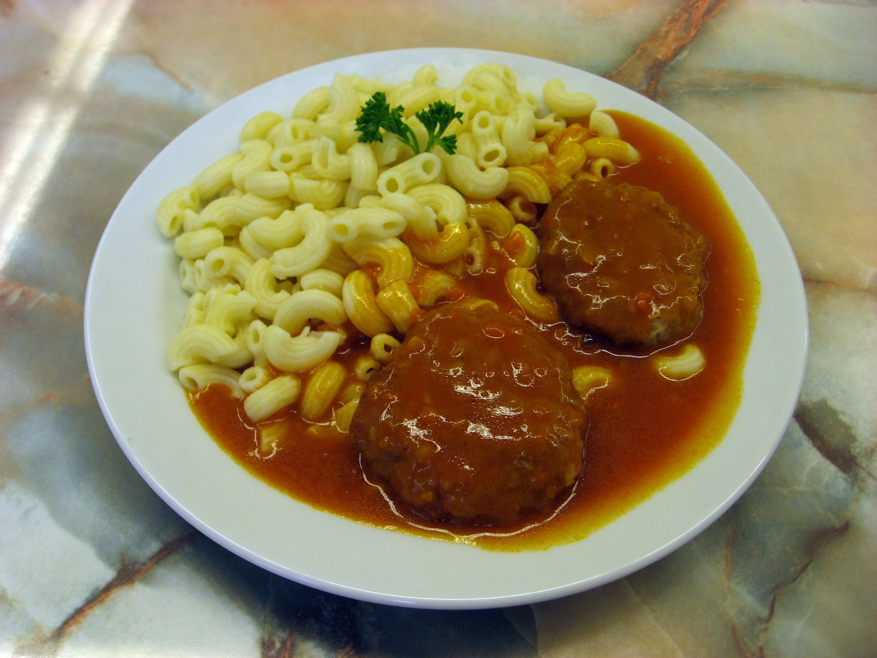 Mleté hovězí maso v rajské omáčce, těstoviny